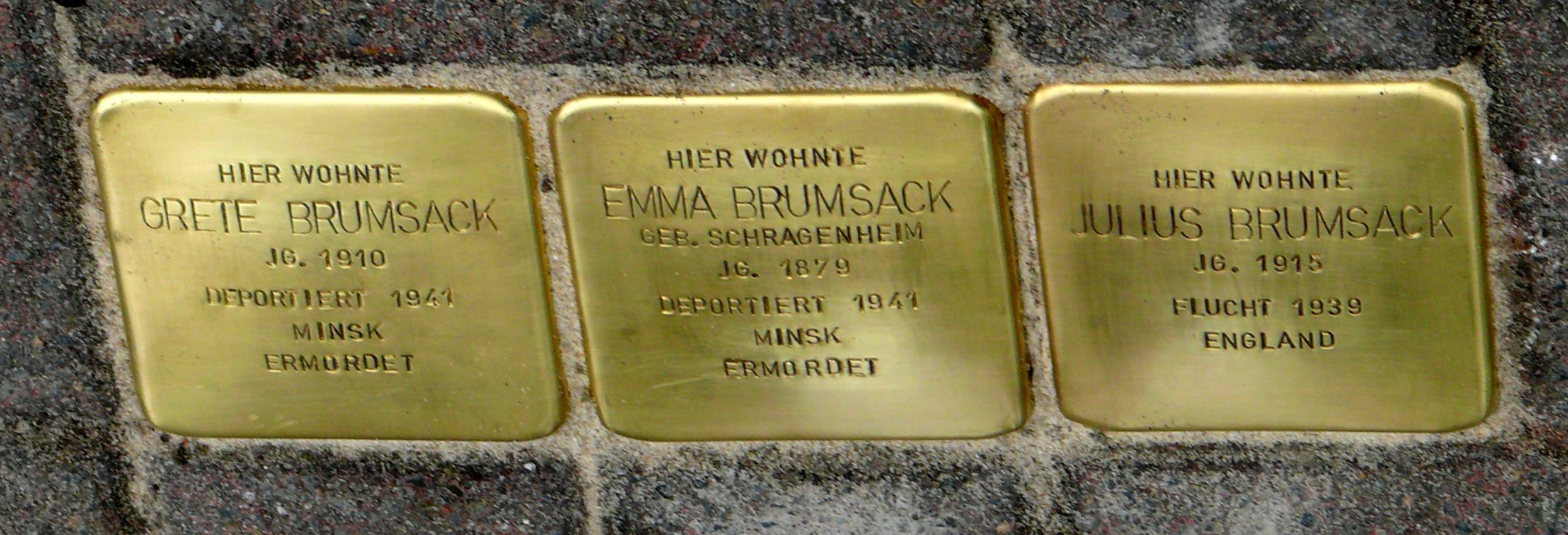 Stolpersteine in Beverstedt, verlegt am 13.6.16